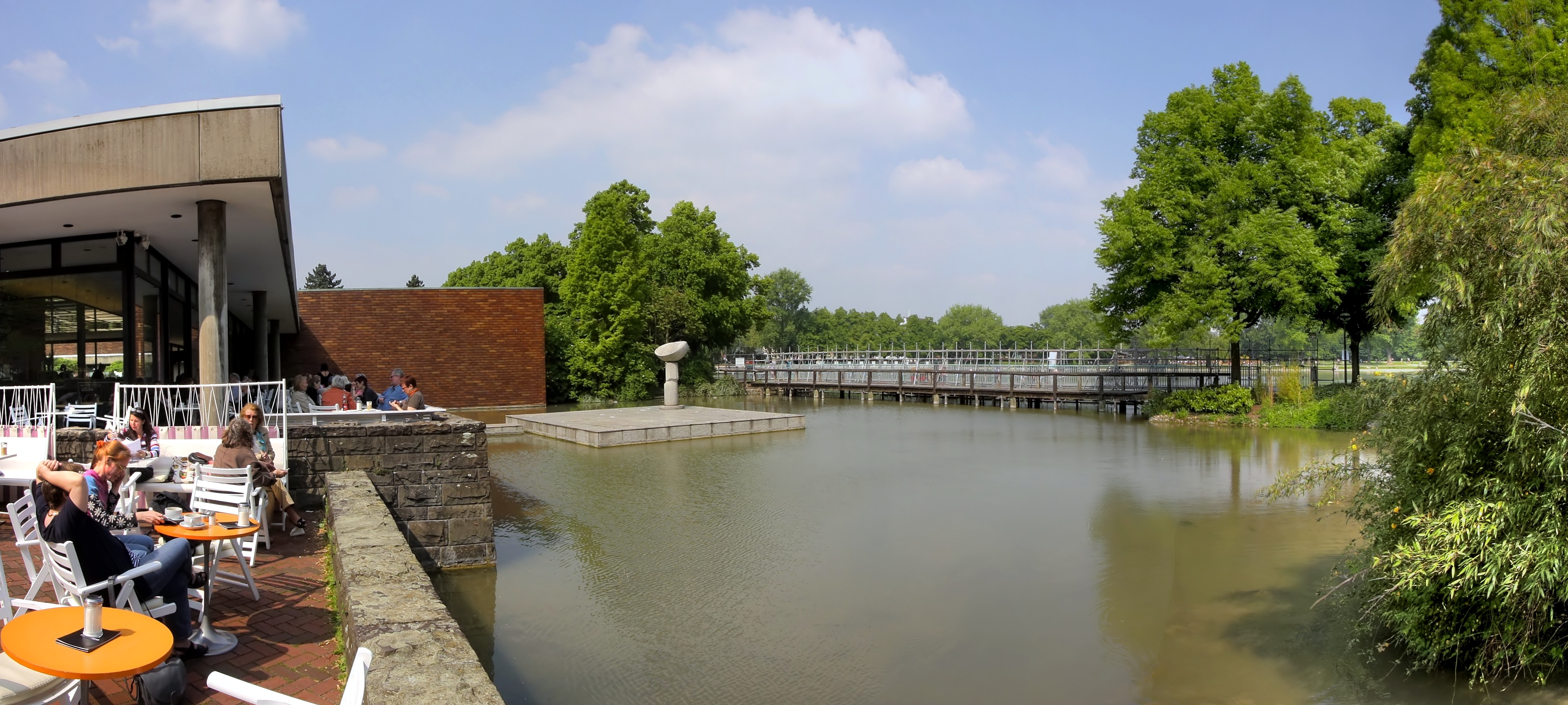 Museum für Ostasiatische Kunst, Köln. Blick vom Museumscafe Richtung Aachener Weiher. Architekt: Kunio Maekawa